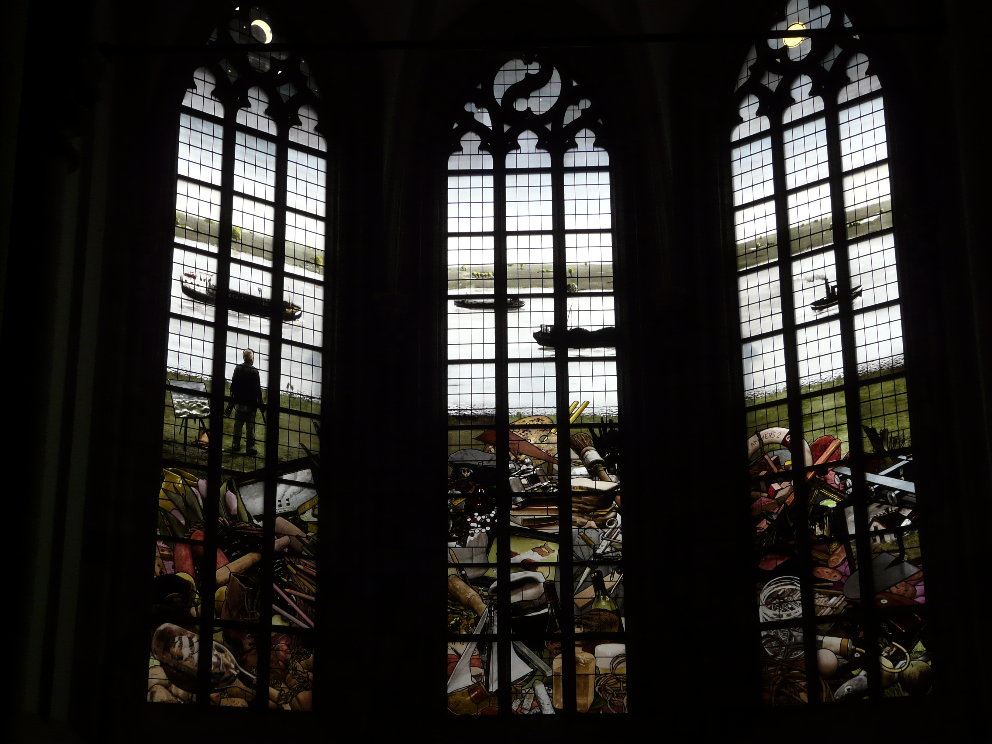 De Gildenramen (2006) van Teun Hocks in de Grote of Onze-Lieve-Vrouwekerk (Dordrecht)